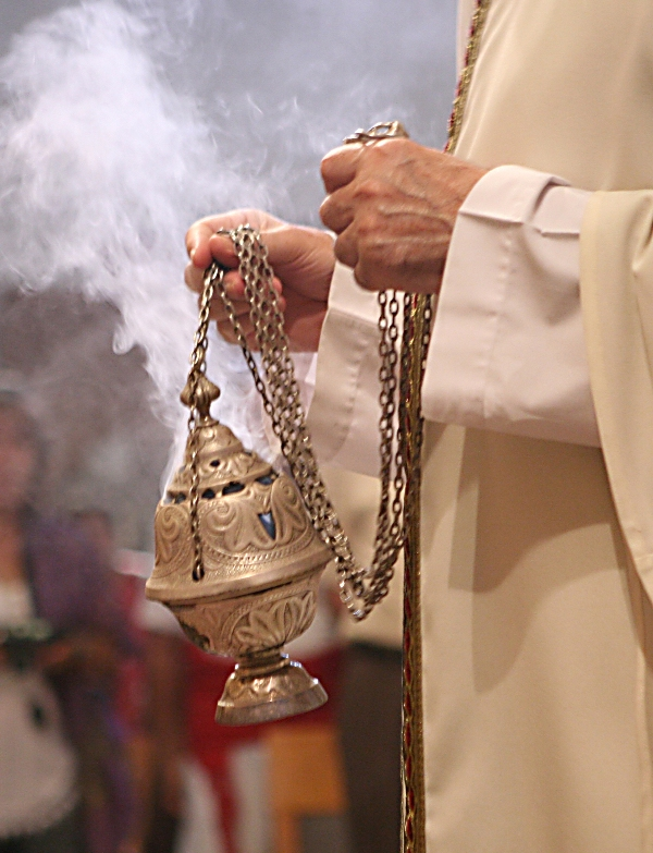 Mossèn Vicenç celebrant missa de Festa Major